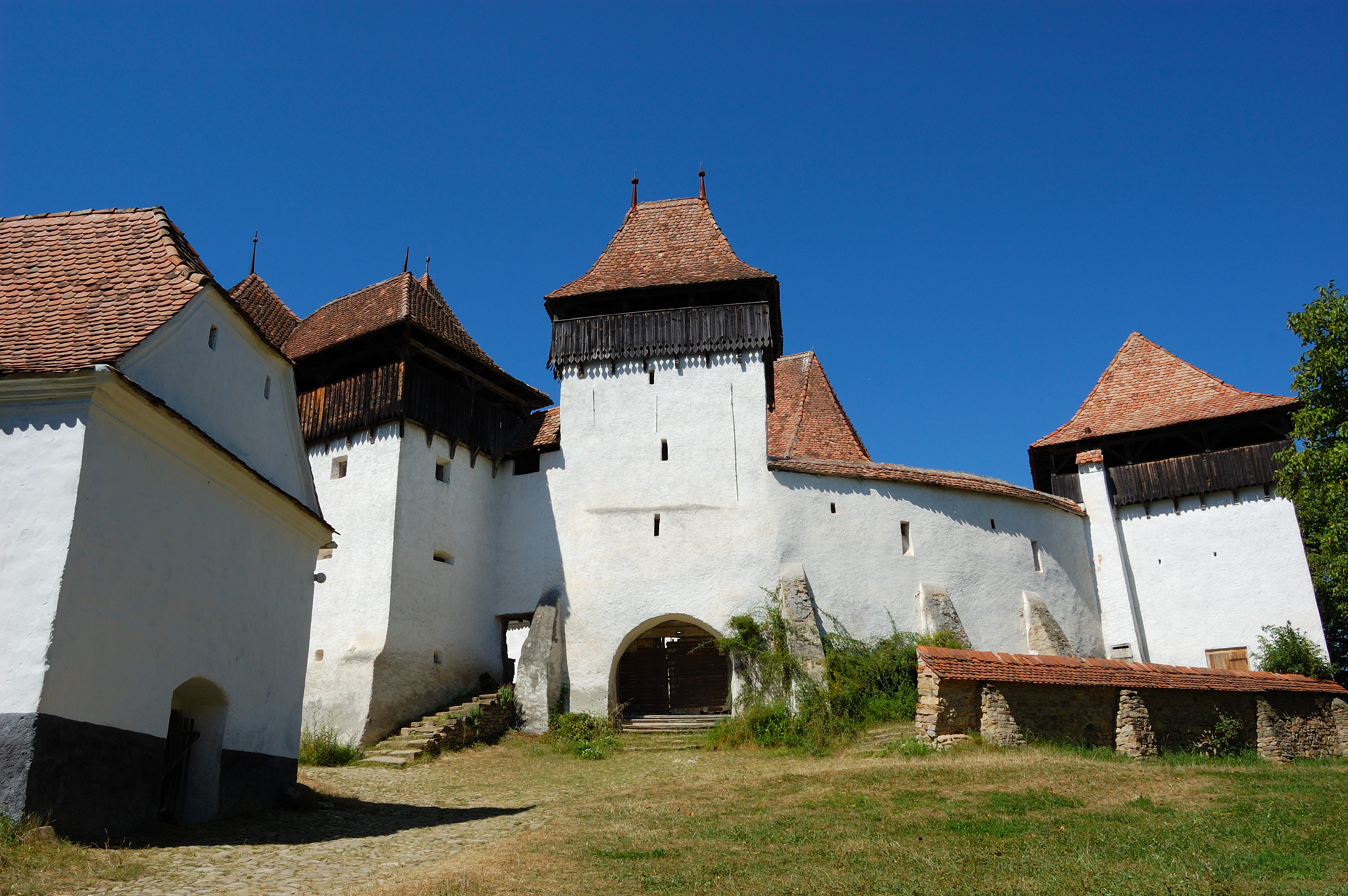 Vedere din exterior asupra ansamblului bisericii evanghelice fortificate din Viscri